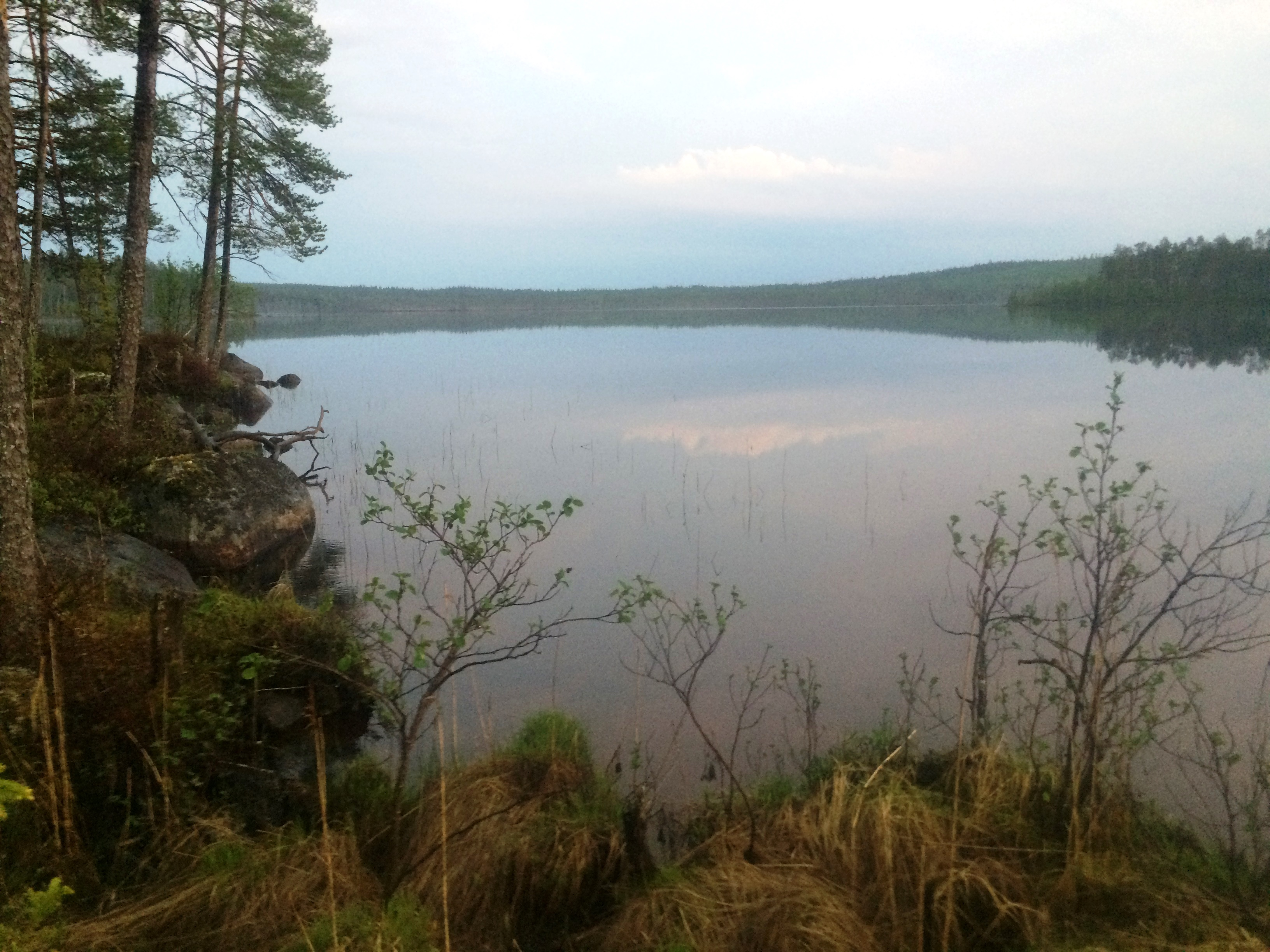 Мечелоут (озеро)